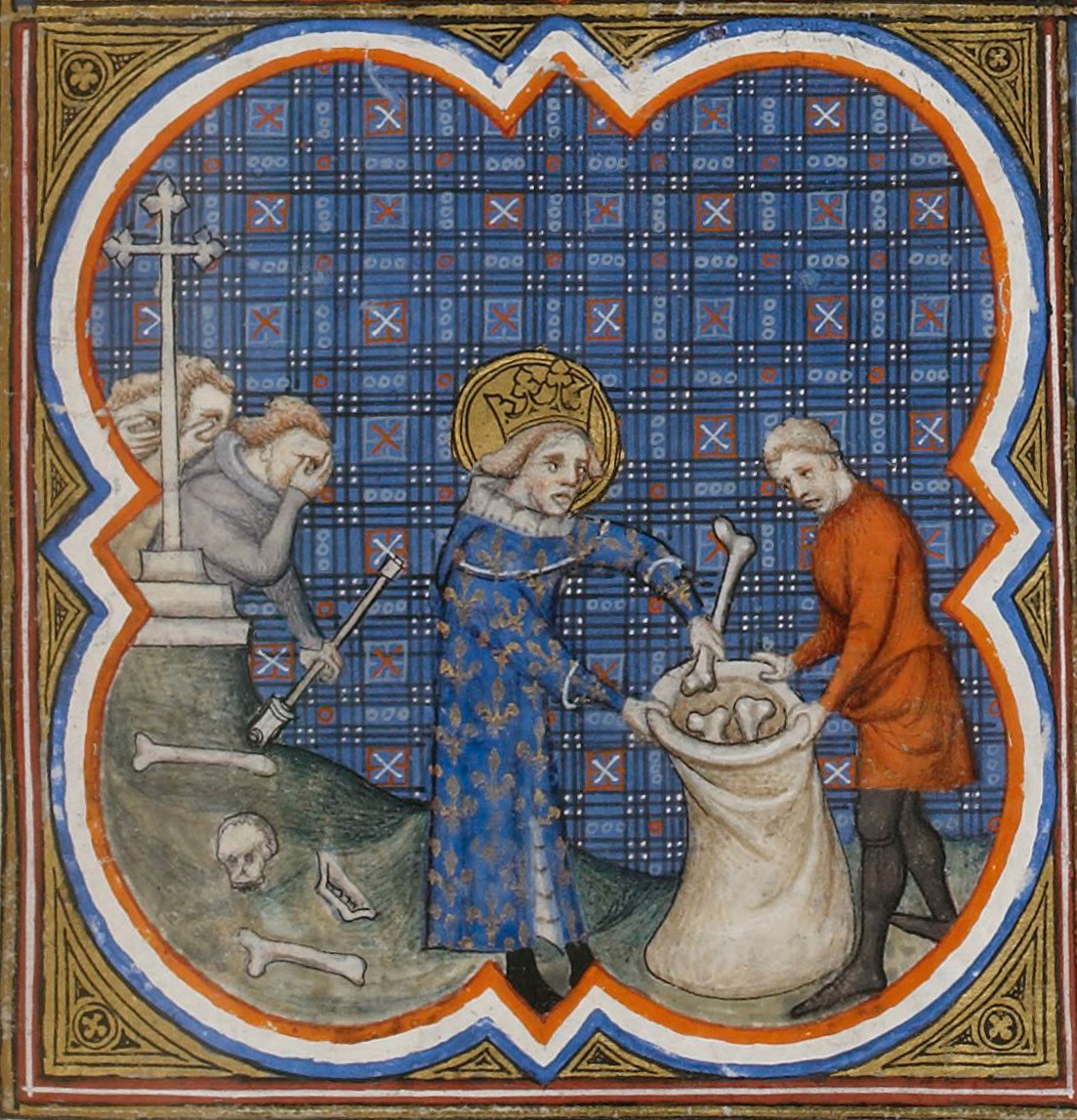 Scènes de la vie de saint Louis. Enluminure des Grandes Chroniques de France, XIVe siècle. Paris, BnF, département des Manuscrits, Français 2813, folio 265 recto.